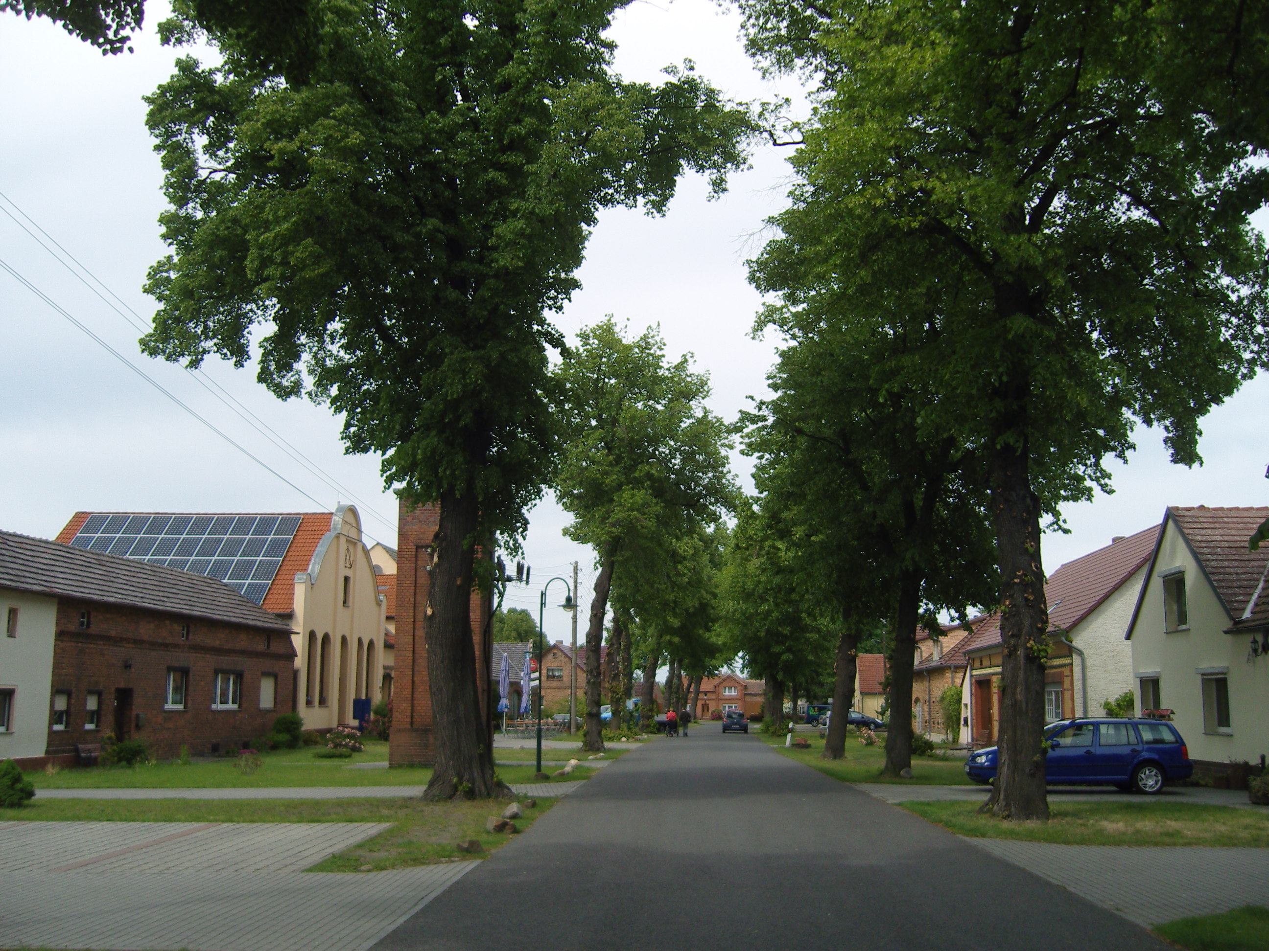 Dorfstraße in Klein Partwitz Hornjoserbsce: Wjesna dróha w Bjezdowach